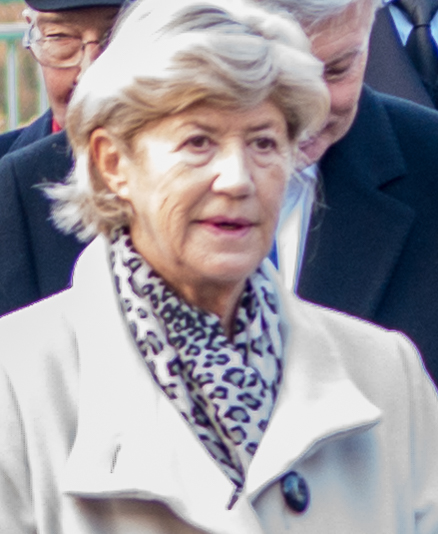 D'Journée de la commémoration nationale erënnert un d'Lutte vum Lëtzebuerger Vollek géint d'Nazi-Okkupatioun am Zweete Weltkrich. D'Commemoratioun ass am Oktober, um Sonnden deen am notse beim 10. Oktober läit. Se erënnert domat un den Echec vun der Personenstandsaufnahme vum 10. Oktober 1941. Feierlechkeete ginn a ville Gemengen ofgehal, an der Stad Lëtzebuerg sinn et der gläich dräi: Beim Nationalmonument vun der Lëtzebuerger Solidaritéit um Kanounenhiwwel, bei der Gëlle Fra op der Constitutiounsplaz a beim Hinzerter Kräiz um Nikloskierfecht. Um Kanounenhiwwel huet de Grand-duc den 9. Oktober 2016 e Kranz néierleeë gelooss an d'Erënnerungsflam vrum Monument raniméiert. No der Heemecht huet hien zesumme mam Chamberpresident, dem Premier an der Stater Buergermeeschtesch d'Monument besicht. Mat der Begréissung vun de Fändeldréier, de Vertrieder vun de patrioteschen Organisatiounen a vun den Holocaust-Affer, den auslänneschen Ambassadeuren, den Autoritéite vu Staat a Gesellschaft an och de Studente vum Stater Kolléisch an der Universitéit goung d'Zeremonie hei zu Enn. D'Deputéiert Simone Beissel.